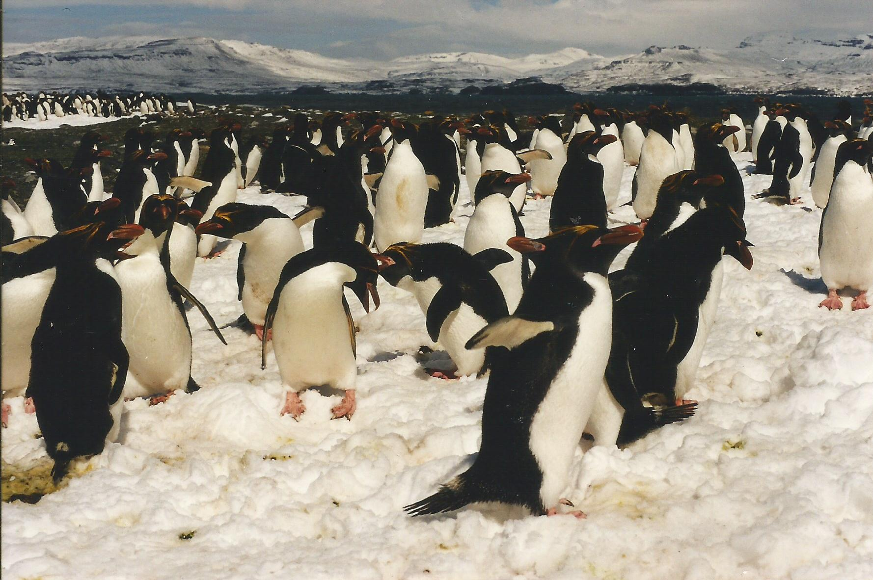 Gorfous dorés (Eudyptes chrysolophus) dans la neige sur la côte nord de la Peninsule Courbet au N-E de la Grande Terre, îles Kerguelen)